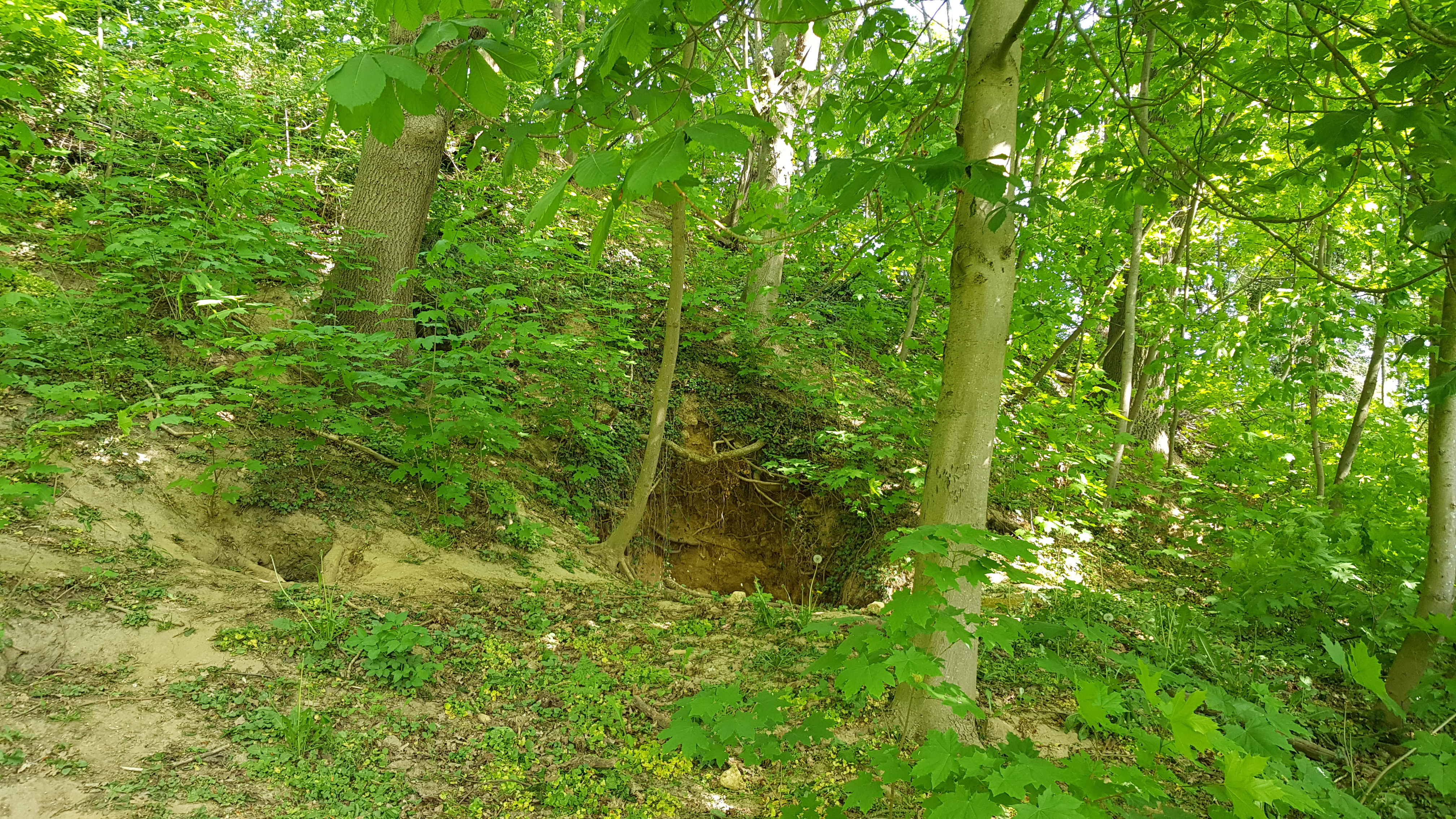 Auvermennekesloak, Craubeek, Nederland